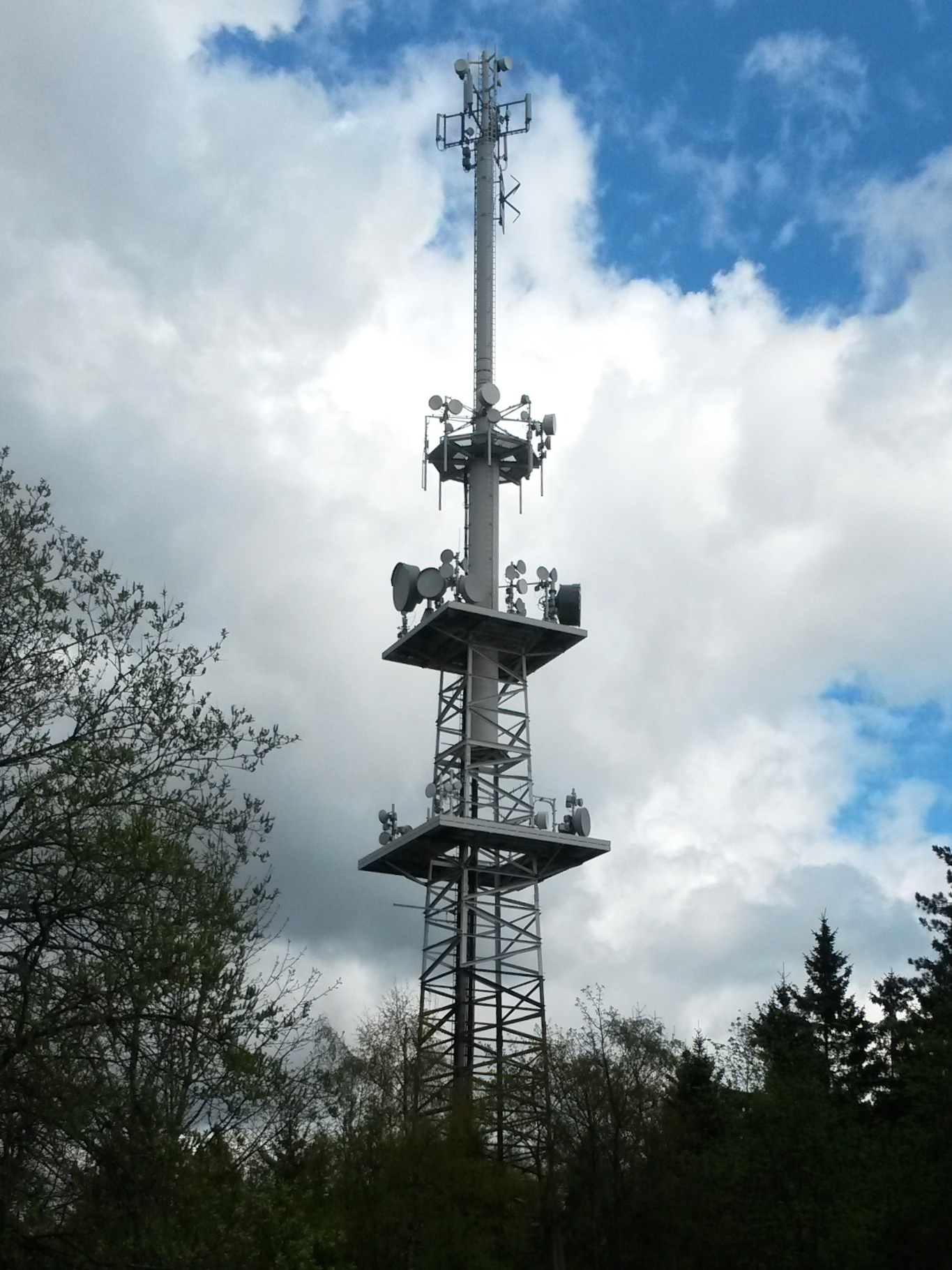 WDR Turm auf dem Kindelsberg,UKW WDR 5 , 97,6 MHz, Richtfunkstrecke zum Sender Nordhelle, Glasfaser zum Sender Siegen Giersberg. Die Frequenz des WDR 5 ist von Sender Giersberg auf diesen Turm aus gewichen. Diverse Handy-Richtfunkstrecken (O2, EPlus, Vodafon) zu Handymasten in der Umgebung. Telekom Handy und das Amateurfunk-Relais befinden sich auf dem Nachbar-Turm..